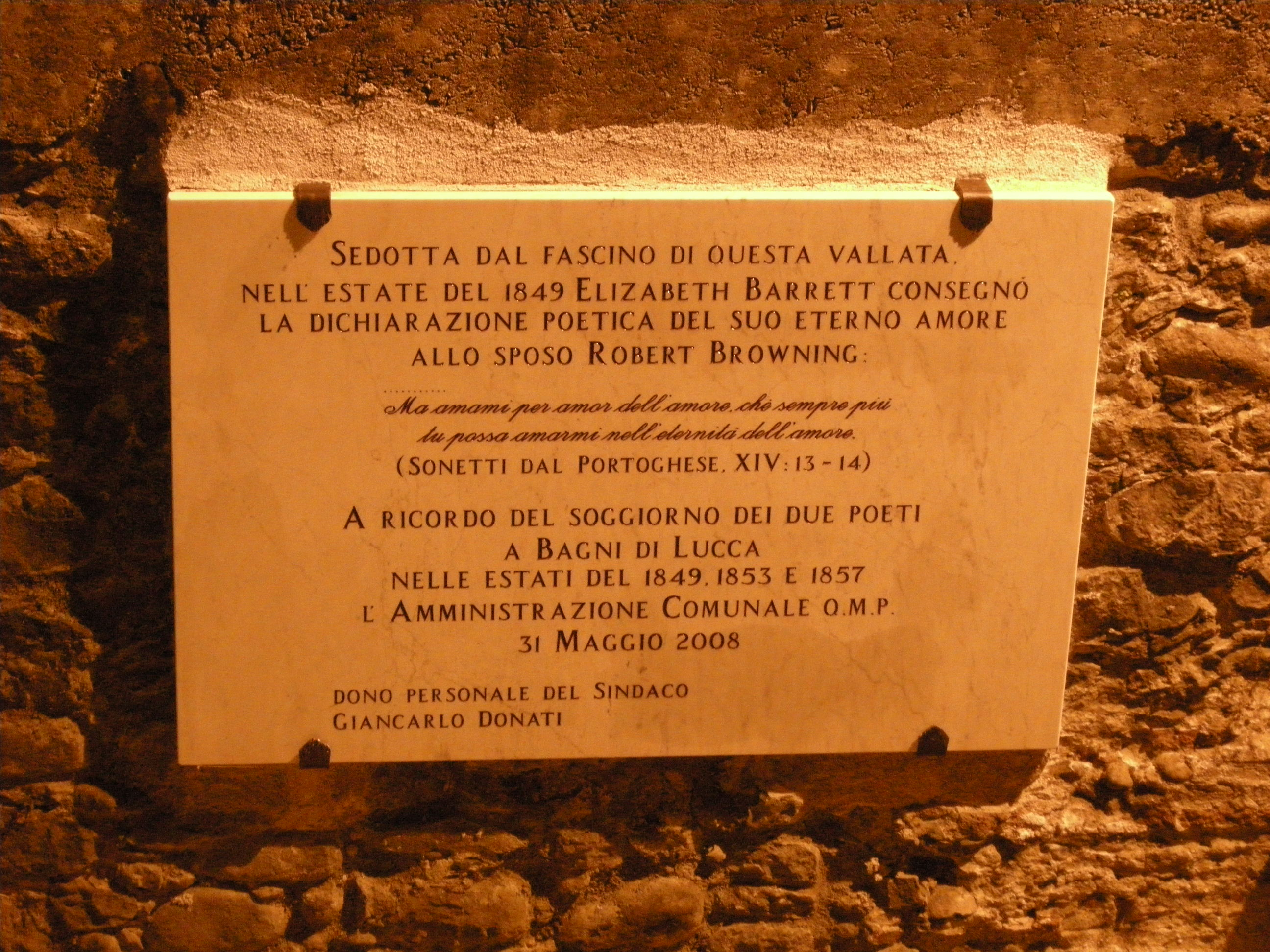 Bagni di lucca, targa elizabeth barrett e robert browning